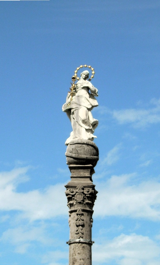 Immenstadt Brunnen